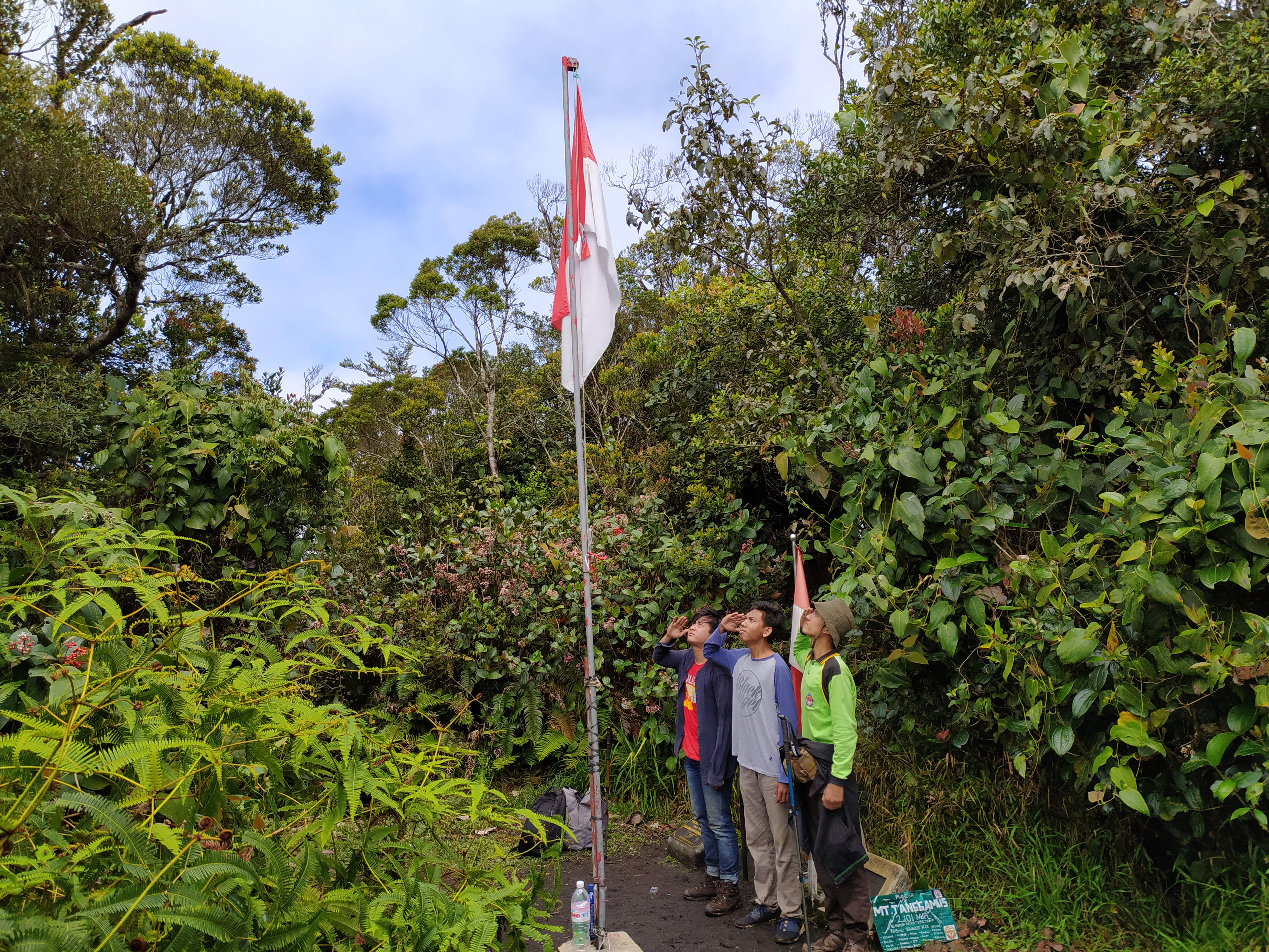 Puncak Gunung Tanggamus Gunung Tanggamus merupakan gunung tertinggi ke dua di lampung, gunung ini berada di kabupaten Tanggamus, Lampung dan merupakan bagian dari Bukit Barisan Selatan . foto ini diambil saat saya melakukan pendakian untuk menggapai puncaknya yang memiliki ketinggian 2102 MDPL, Walaupun ketinggiannya hanya 2102 namun tanggamus memiliki medan yang sulit untuk di lalui